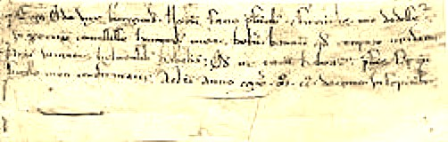 Droit de ban des vendanges cédé à Beaune par Eudes III de Bourgogne en septembre 1210